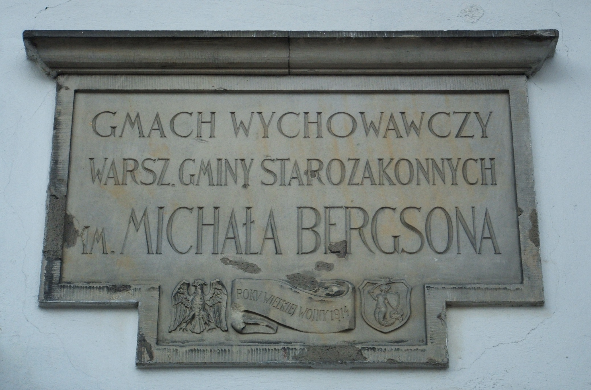 Tablica na budynku dawnego Gmachu Wychowaczego Warszawskiej Gminy Starozakonnych im. Michała Bergsona